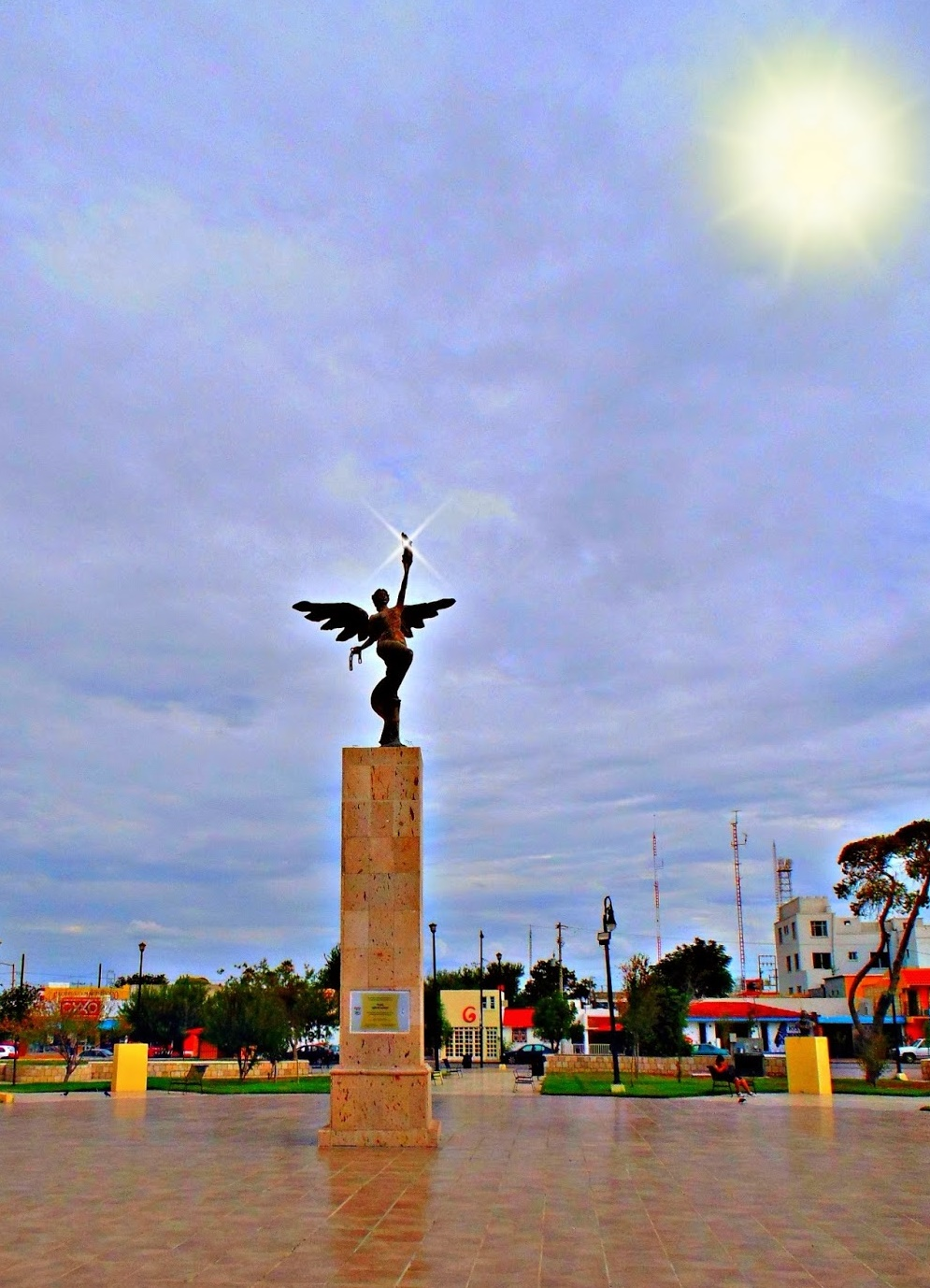 El Angel de Sabinas